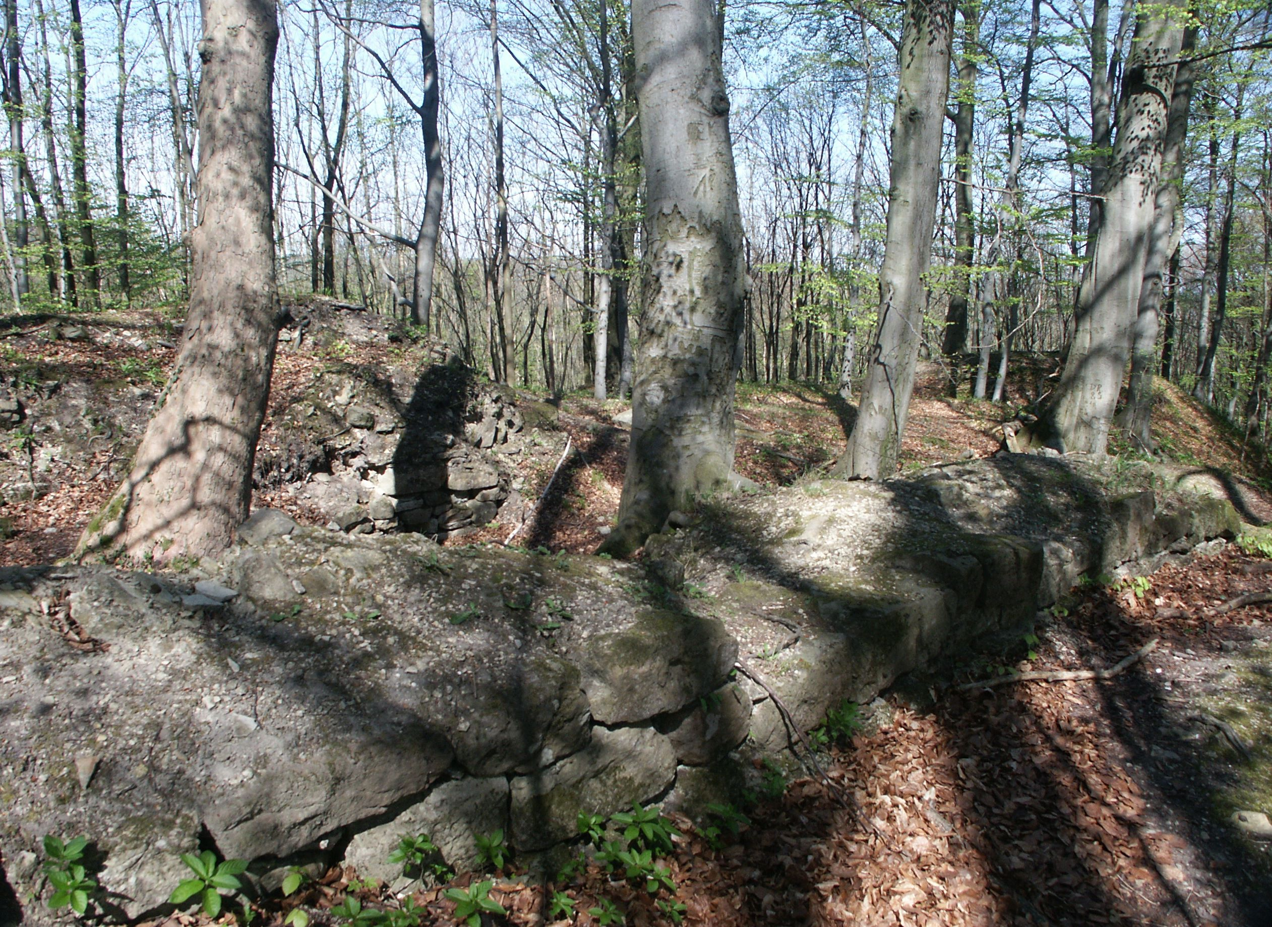 Ruine Dreienburg, Mauerreste